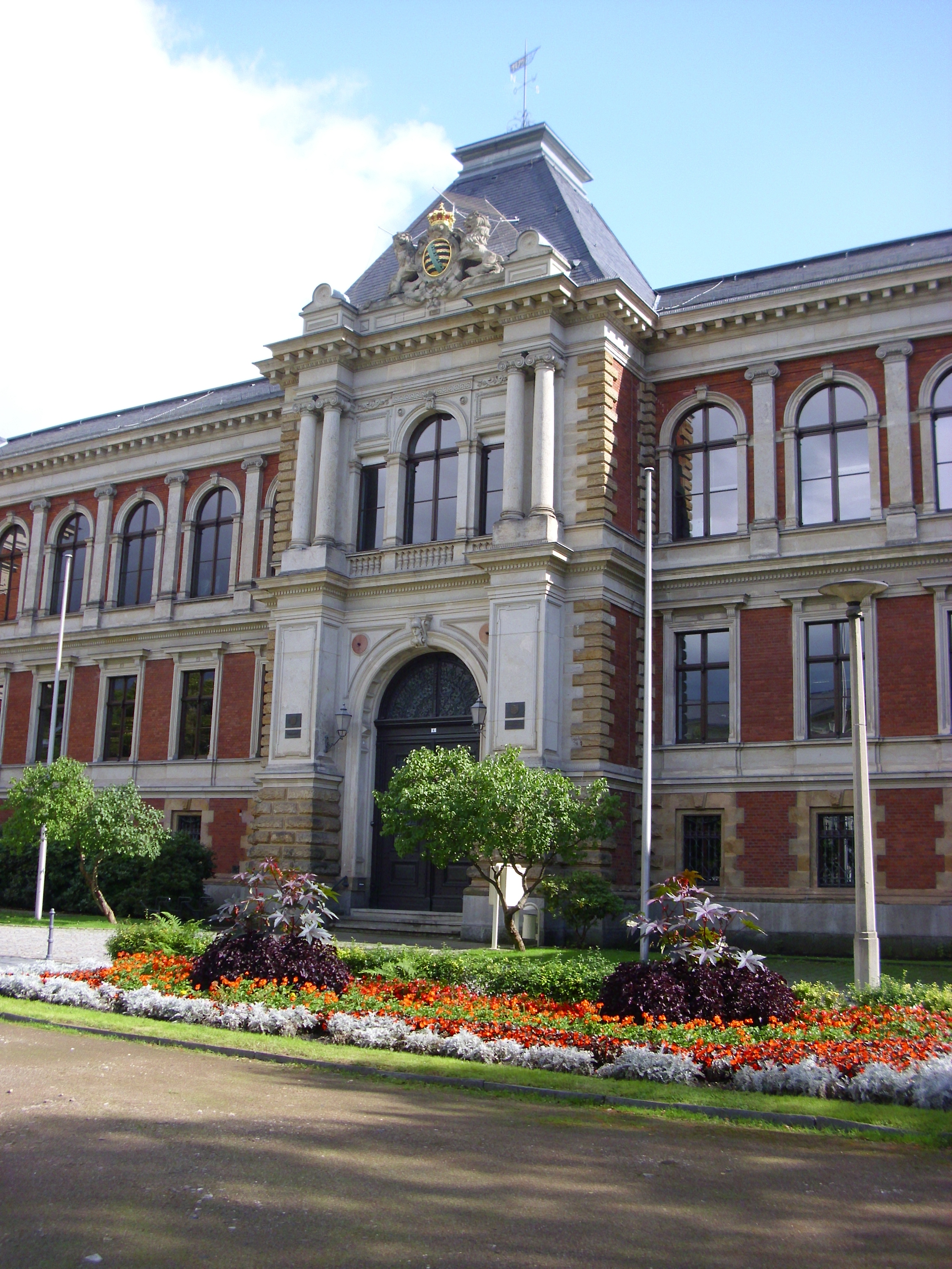 Amtsgericht Zwickau Platz der deutschen Einheit 1 Zwickau 02